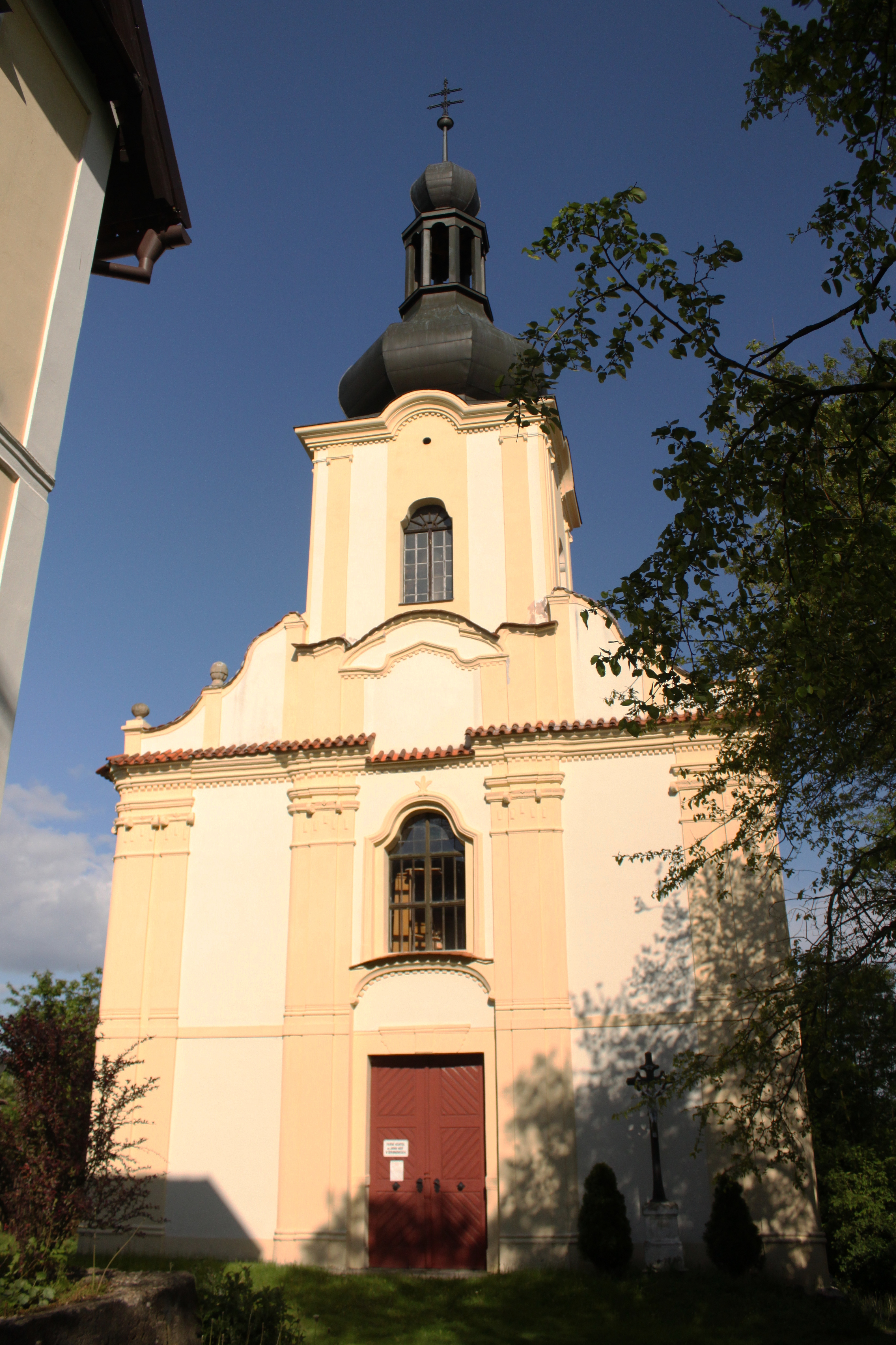 Vesnice Šemanovice, část obce Kokořín, Česká republika Project: Fotíme Česko.